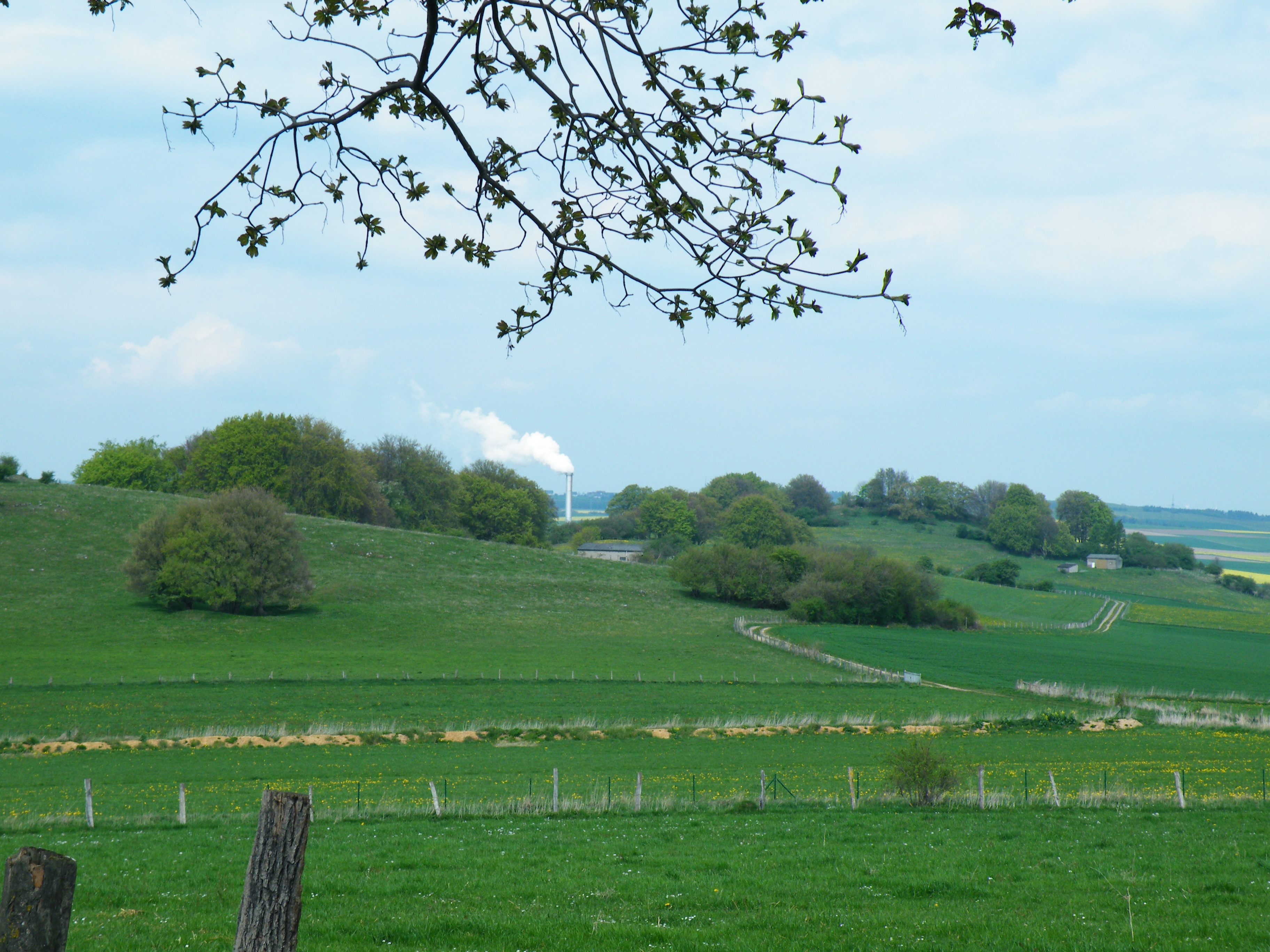 Bereich Scheffelberg des Naturschutzgebietes Scheffelberg/Kalberstert von Südwesten. Nur die Kuppen und Hanglagen gehören zum Naturschutzgebiet. Im Bildhintergrund Schornstein der Firma Egger.